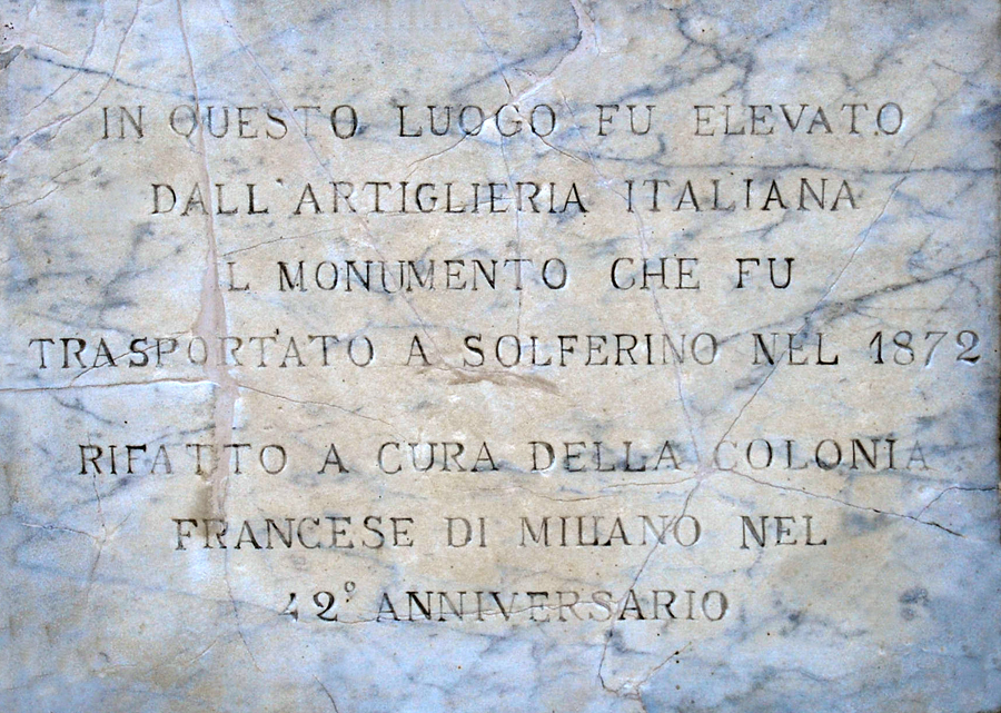 Cà Morino, lapide posta sul monumento ai caduti francesi.